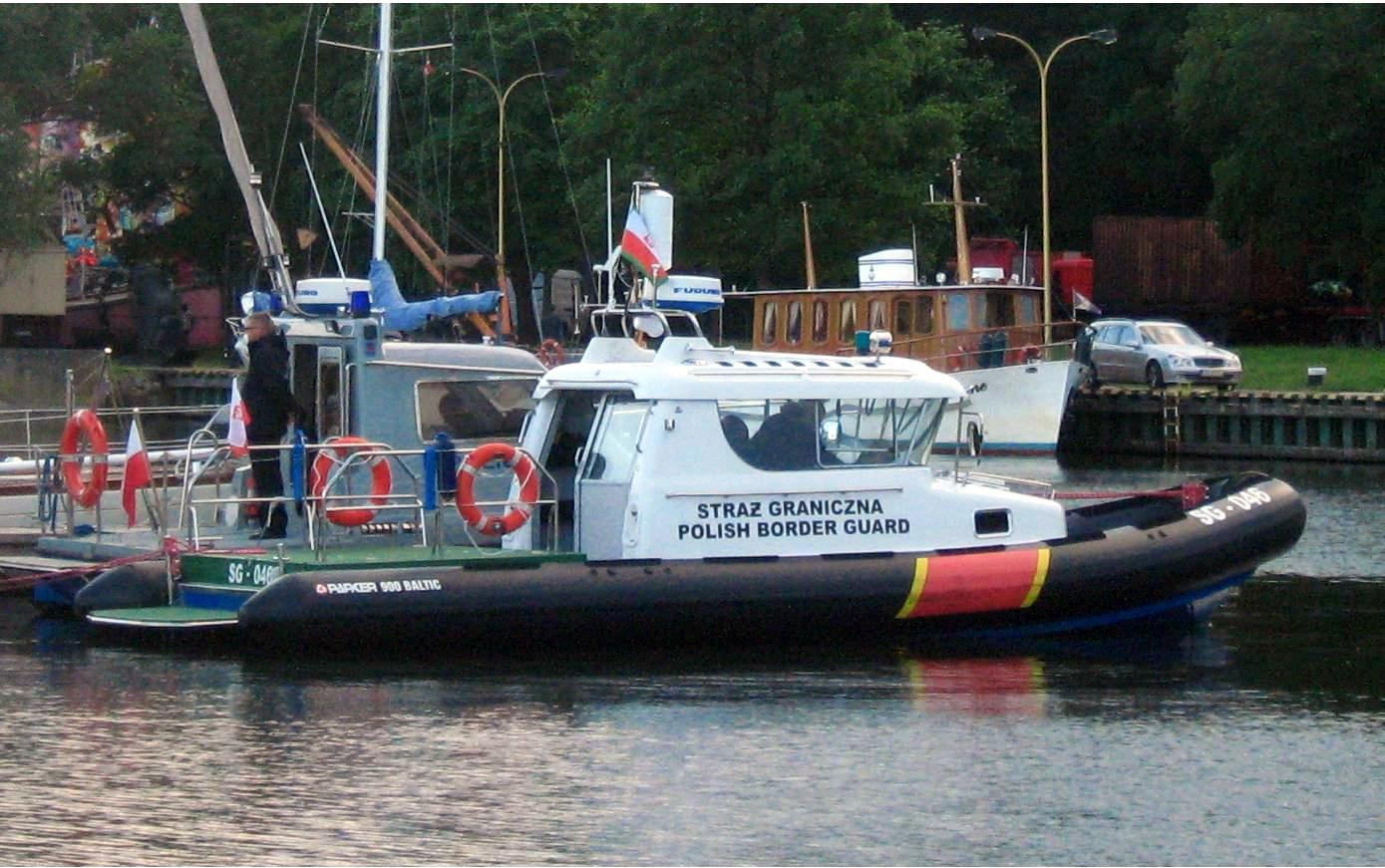 Łódź Morskiego Oddziału Straży Granicznej SG-046